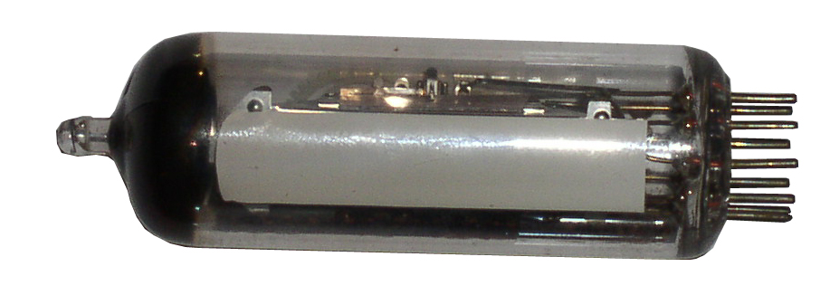 EM84 indicatorbuis EM84, 68x20mm